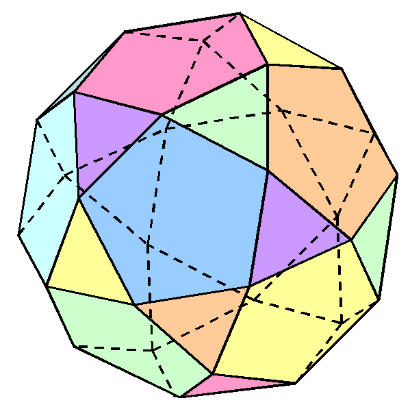 ruimtelijk figuur - eigen werk ism danielm - publiek domein